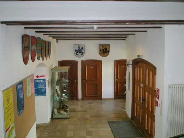 Im_Foyer_der_Burg_von_Stolberg_(Rhld.)